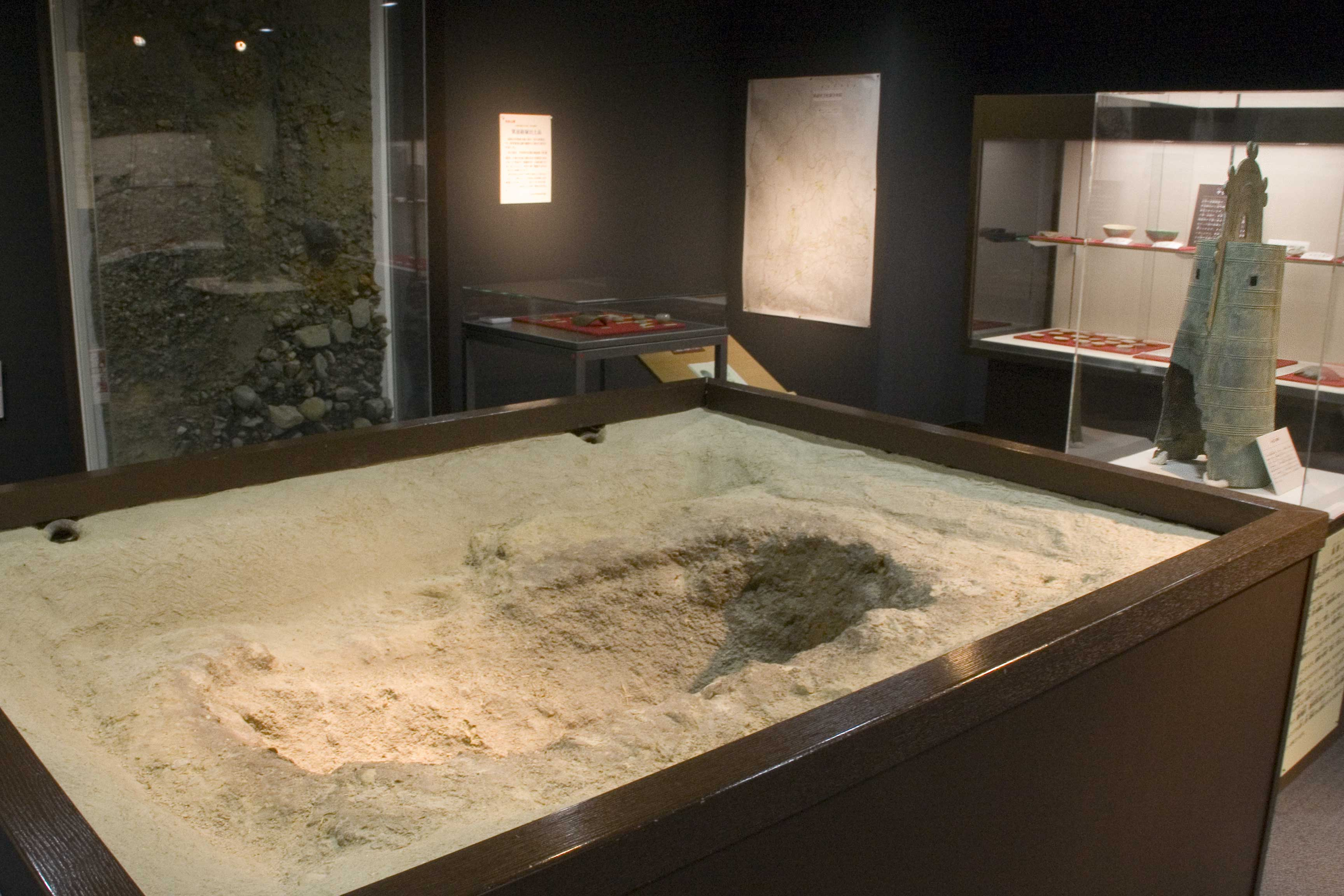 箕面市立郷土資料館 如意谷銅鐸と埋納穴